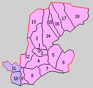 長崎県北高来郡の町村制時点の町村。